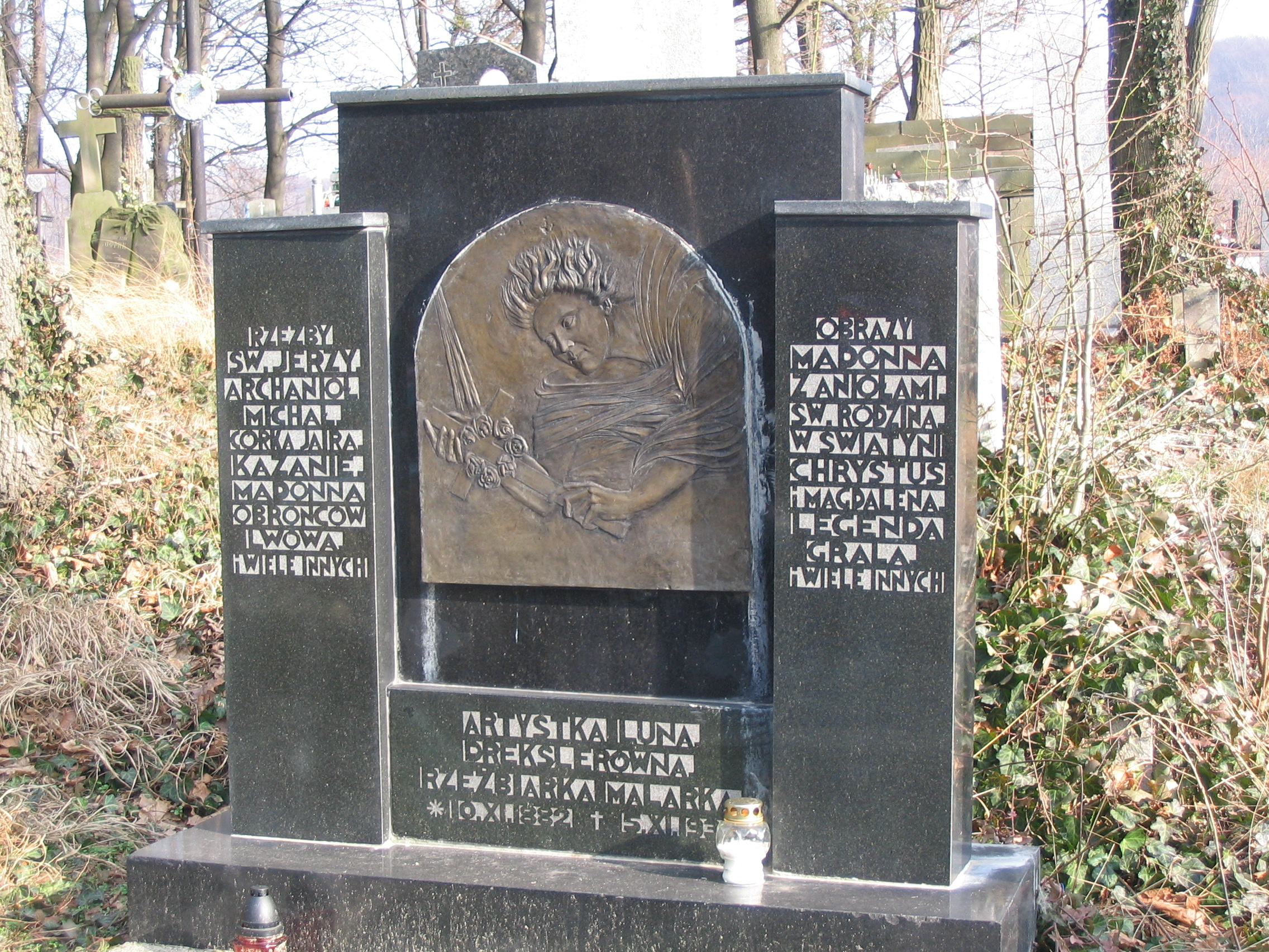 Grobowiec Luny Drexlerówny na cmentarzu Łyczkowskim we Lwowie